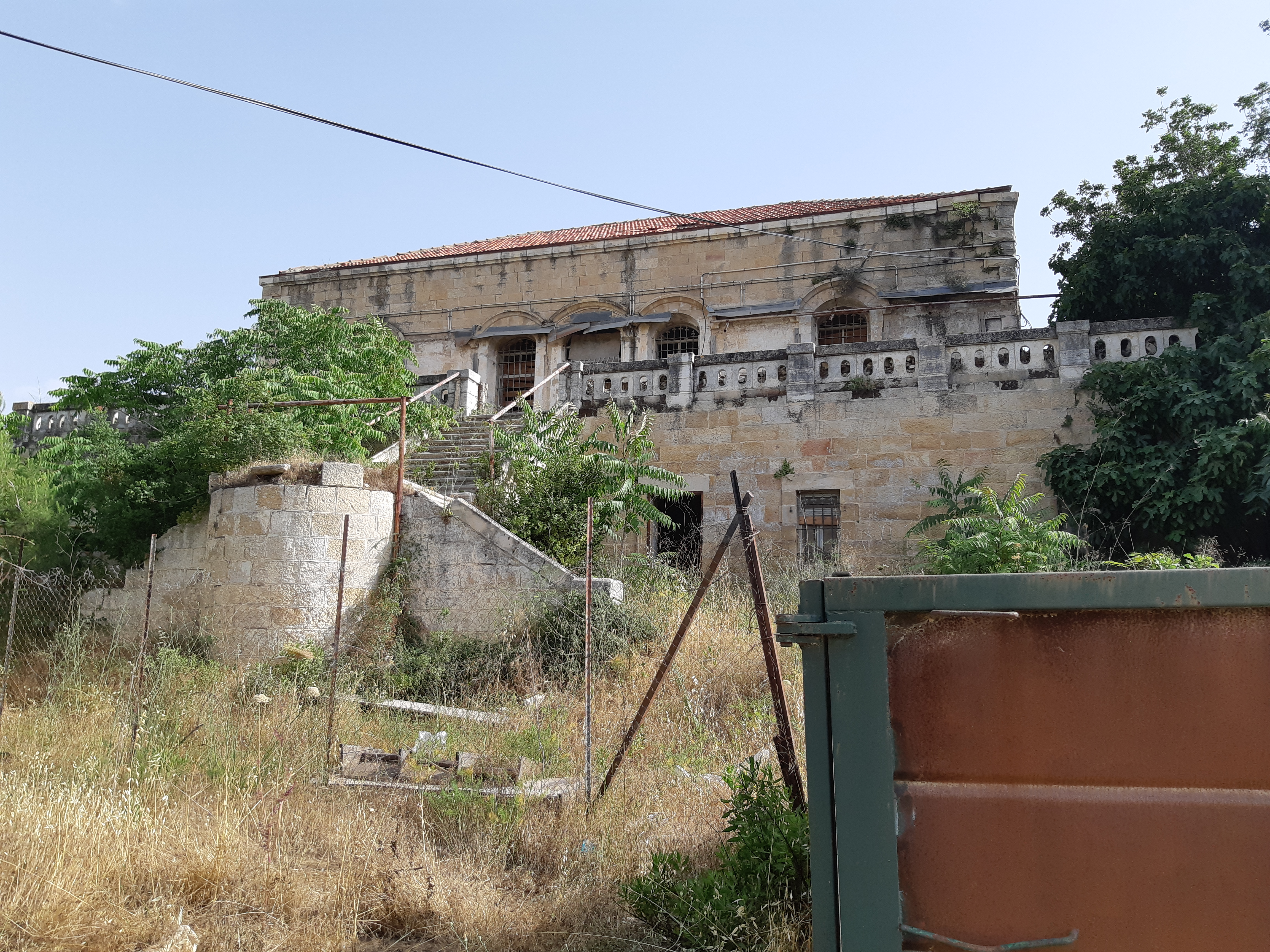 משטרת אבו גוש - המבנה הראשוני של המשפחה הערבית